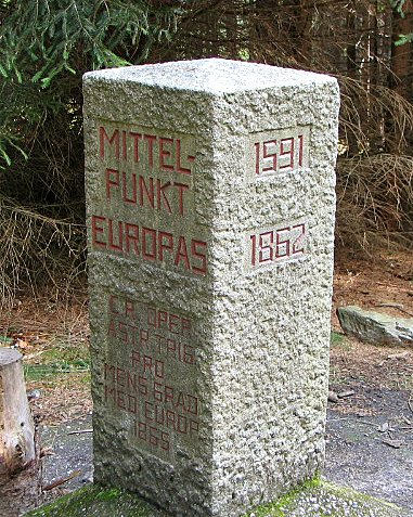 Mittelpunkt Europas is near Dyleň.